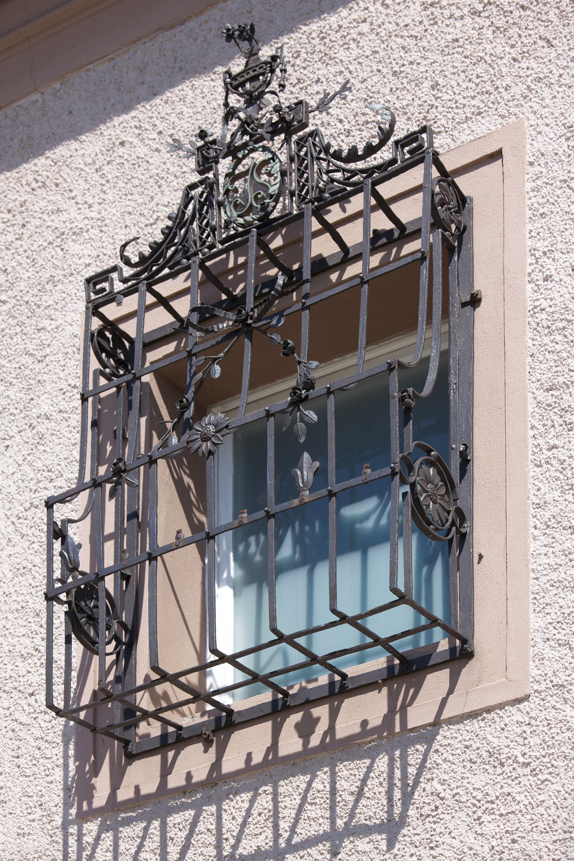 Schmiedeeiserner Fensterkorb der Hammerschmiede Inzersdorf in klassizistischen Formen, Anfang 19. Jahrhundert. Die Initialen „JS“ verweisen auf den Hackenschmied Joseph Schleifer.